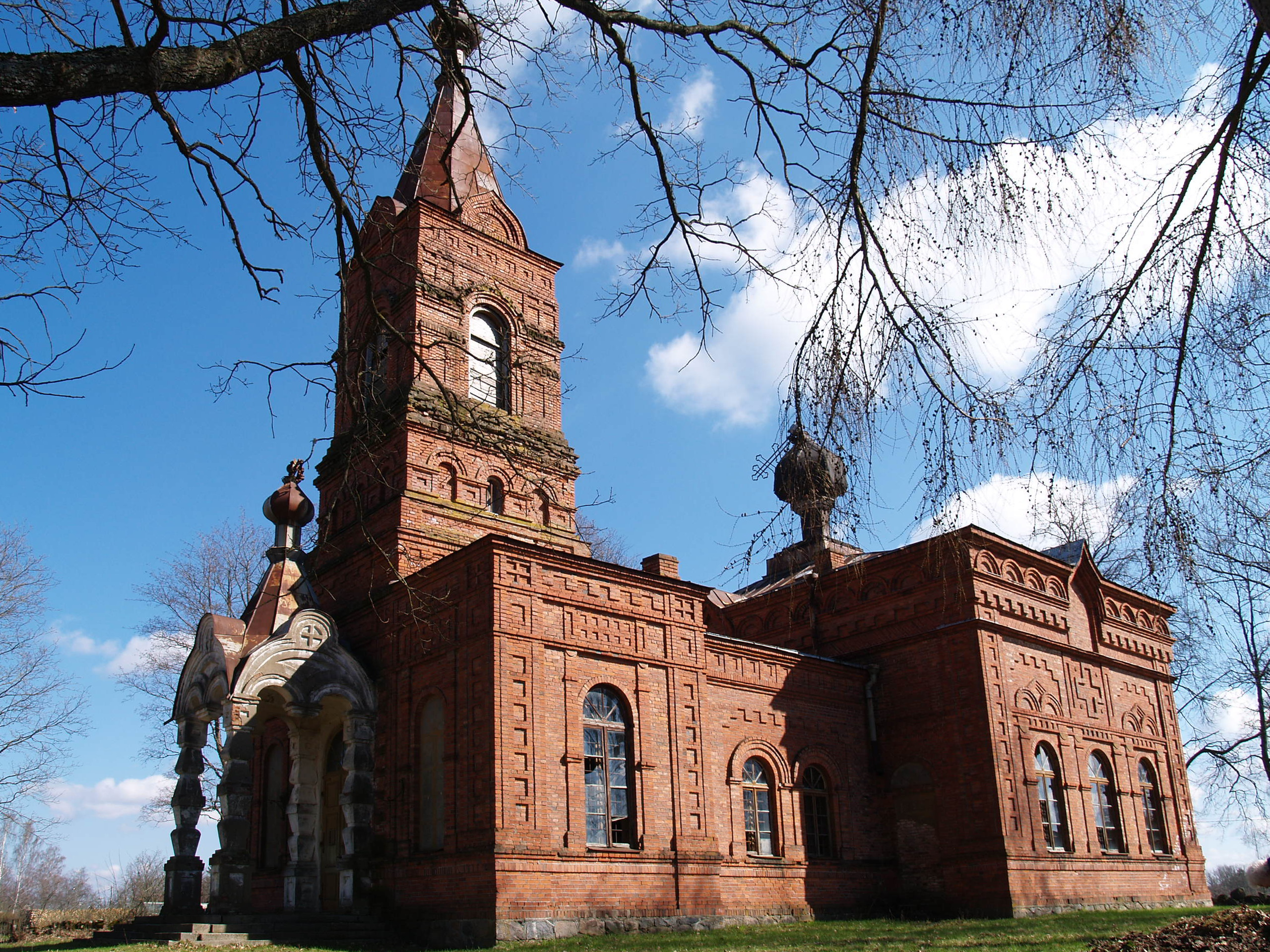 Suure-Jaani õigeusu kirik